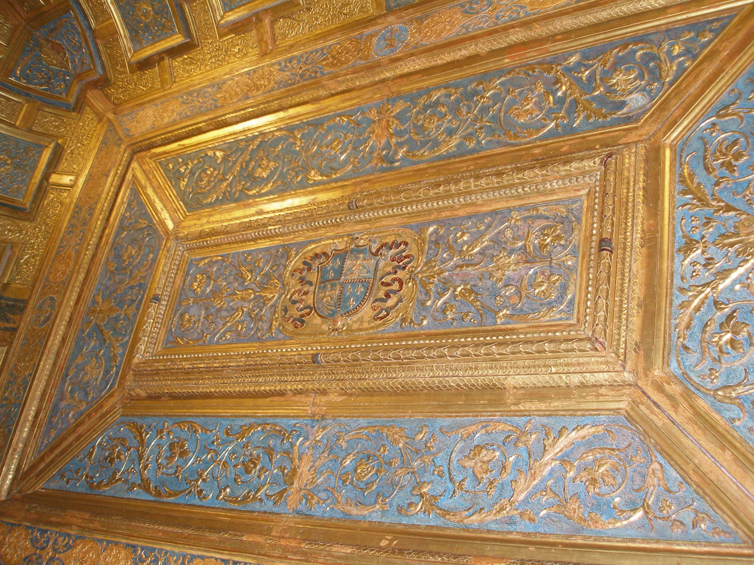 Mantua